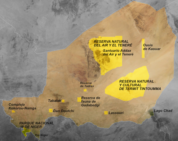 Procede de "Niger protected areas parks 2005.png"